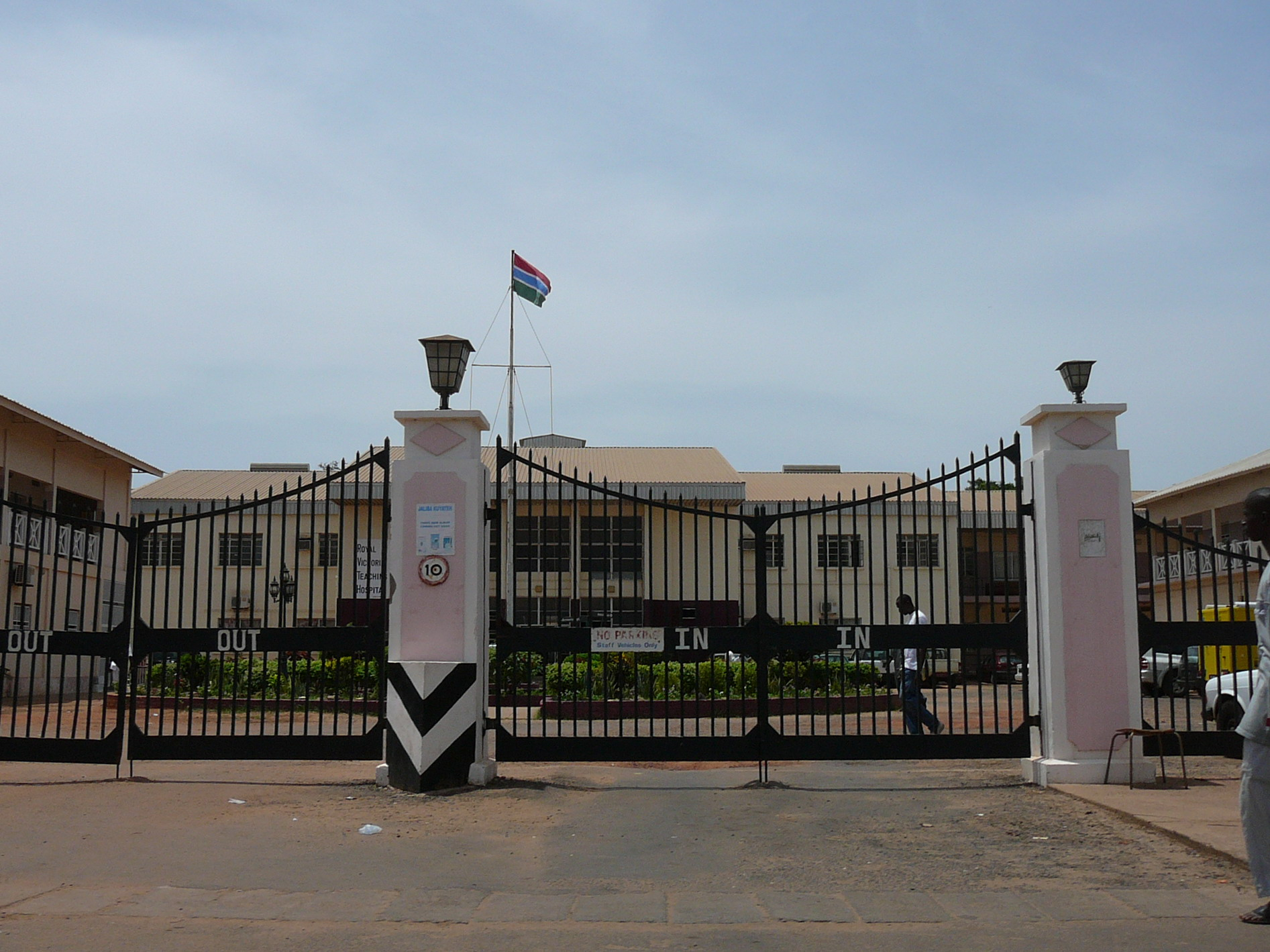 Straße in Banjul